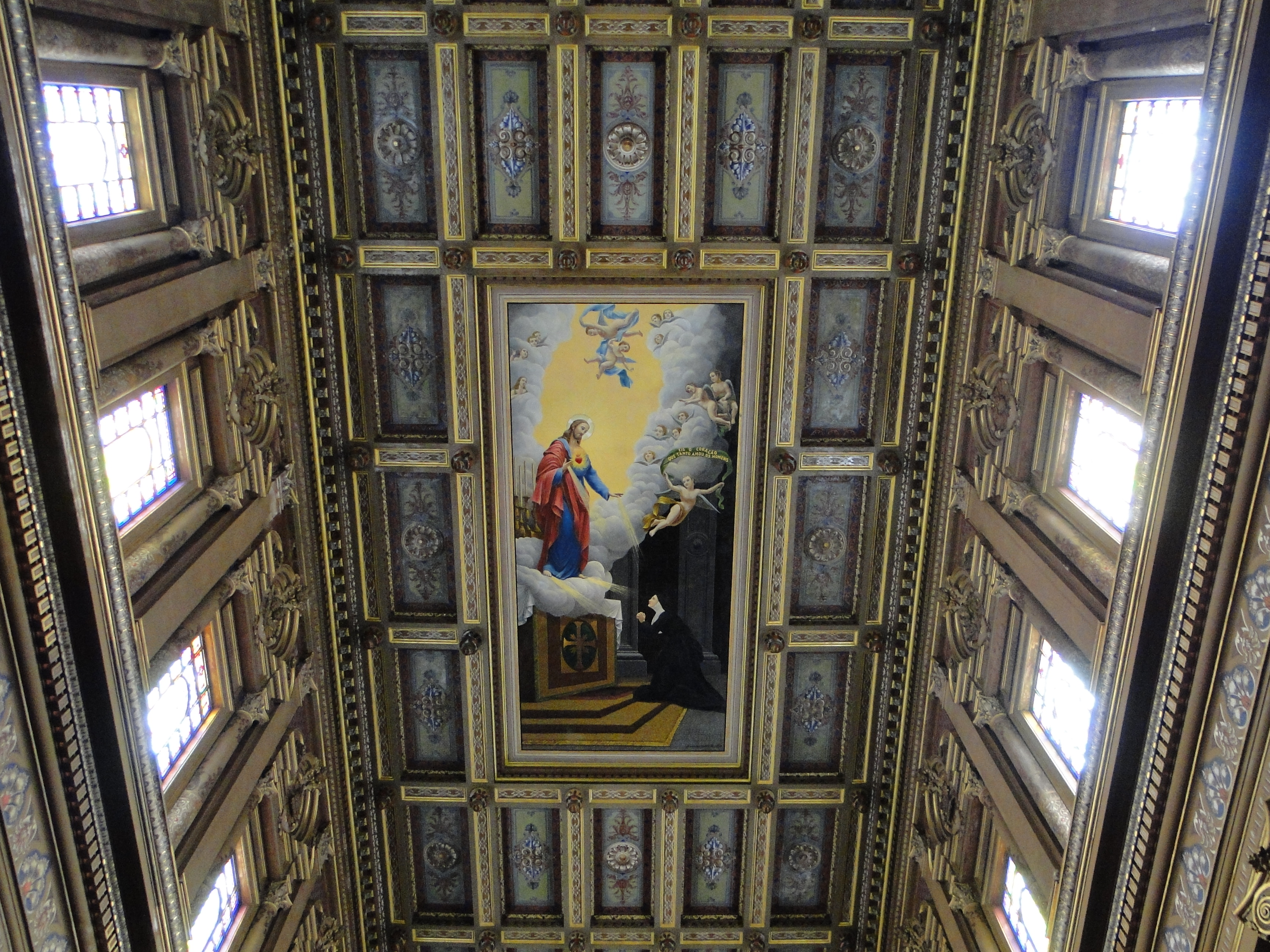 Imagem do Sagrado Coração de Jesus no teto da nave central do Santuário do Sagrado Coração de Jesus, em São Paulo (SP), Brasil.